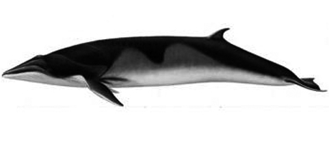 El rorcual austral o Minke antártico (Balaenoptera bonaerensis) es una especie de cetáceo misticeto de la familia Balaenopteridae.